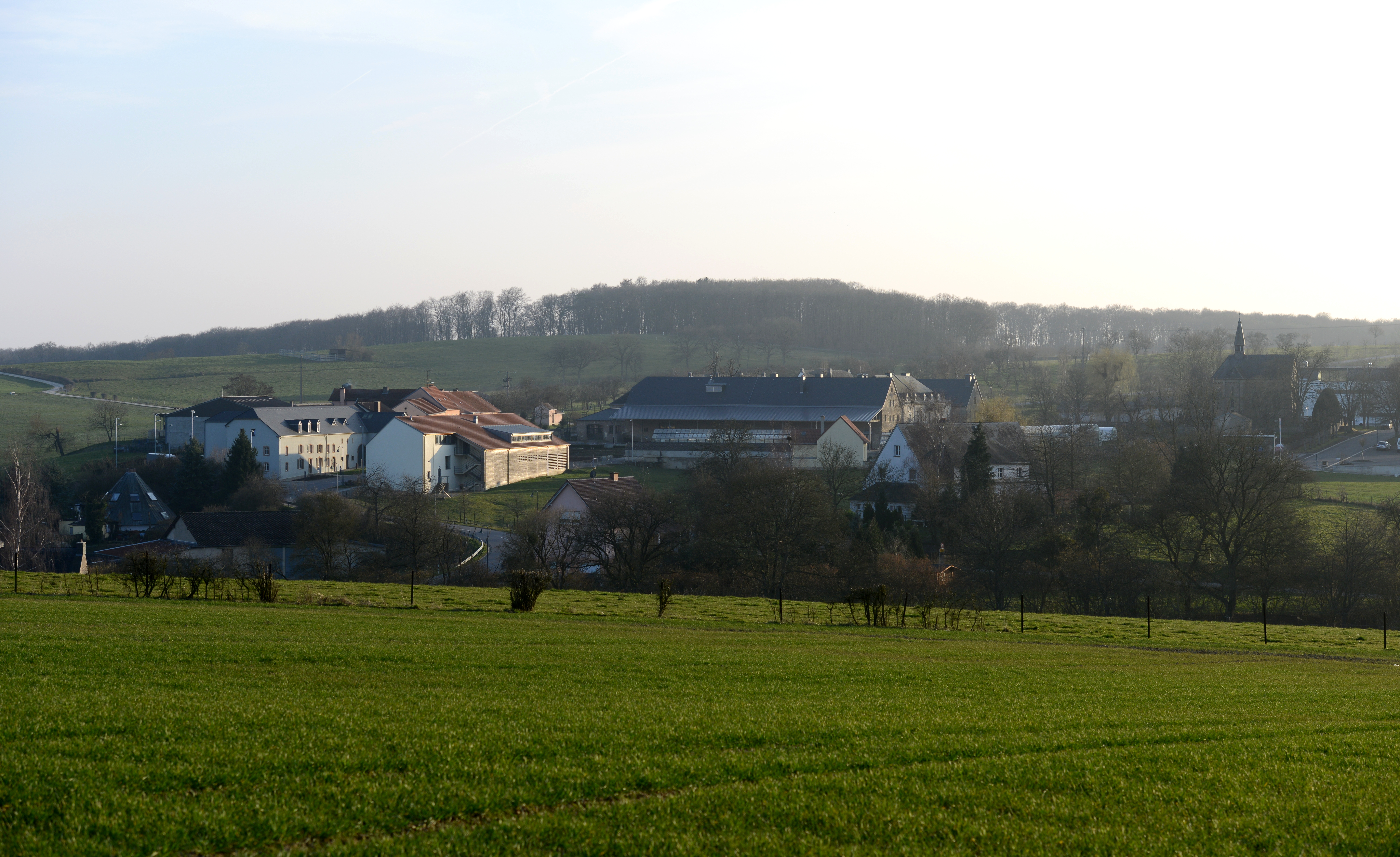 Vue op de Prisong vu Giwenech.